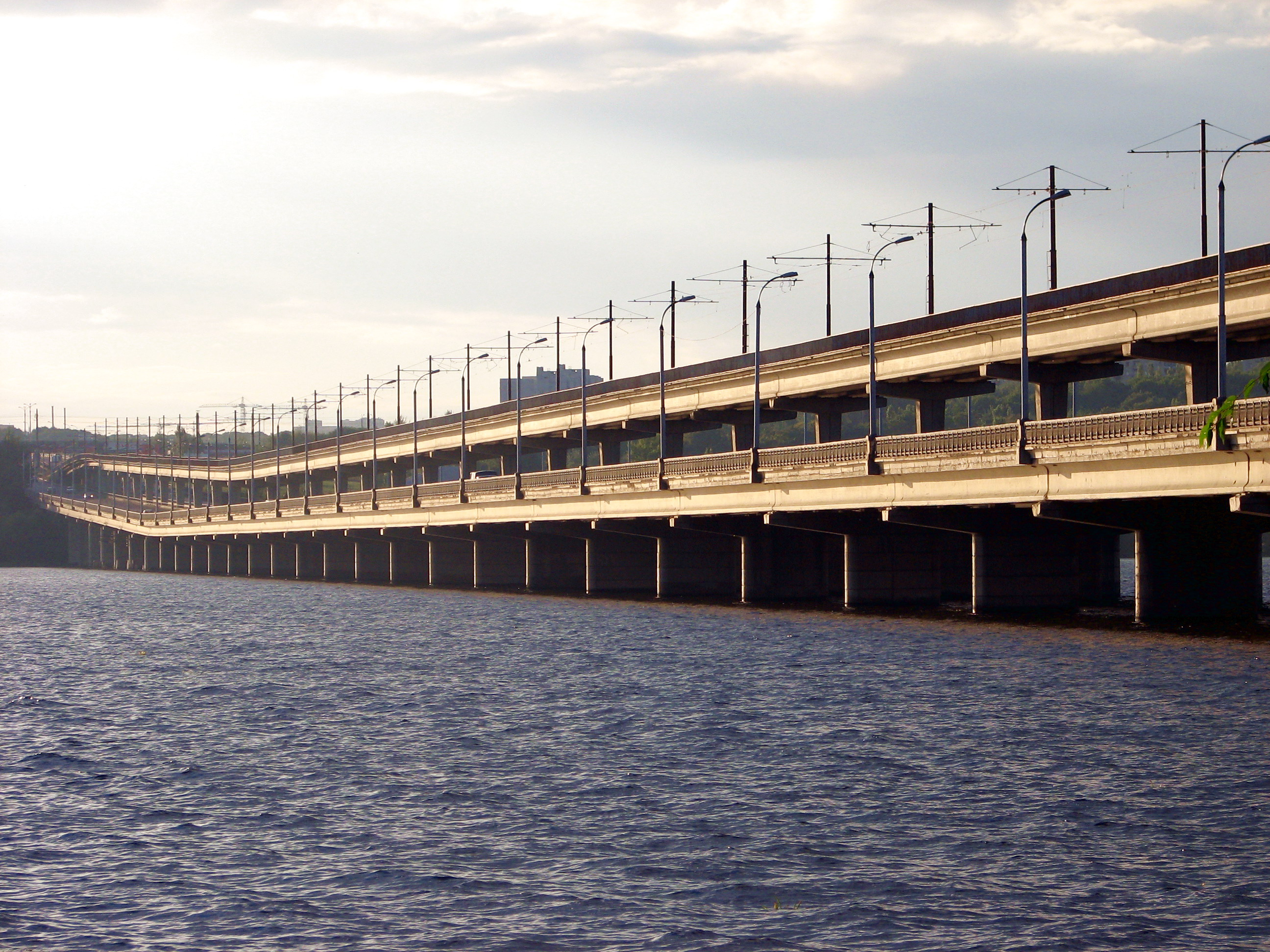 Северный мост (Воронеж)